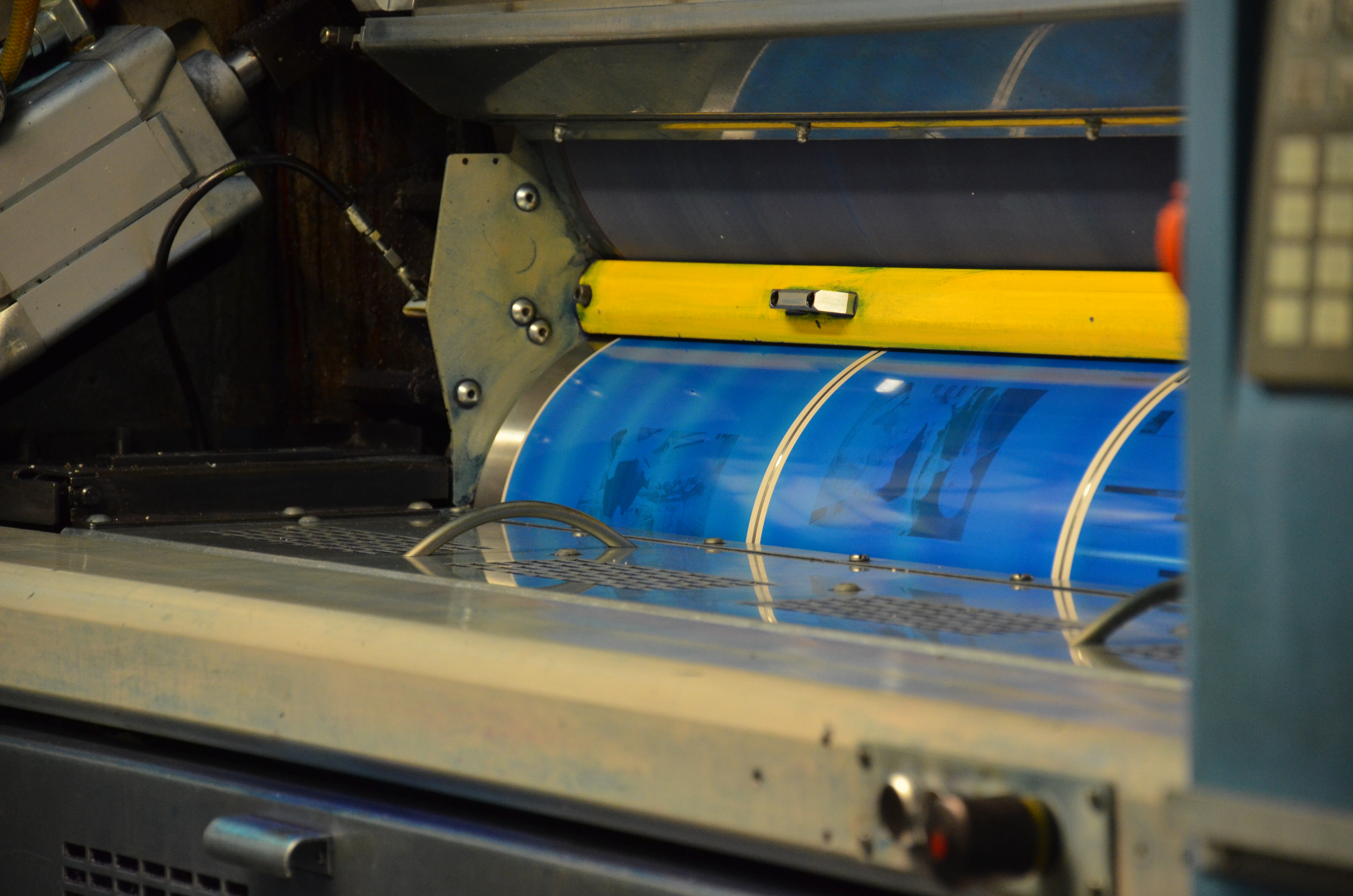 Druckhaus der WAZ Mediengruppe in Essen Druckmaschine mit Platten bestückt und eingefärbt